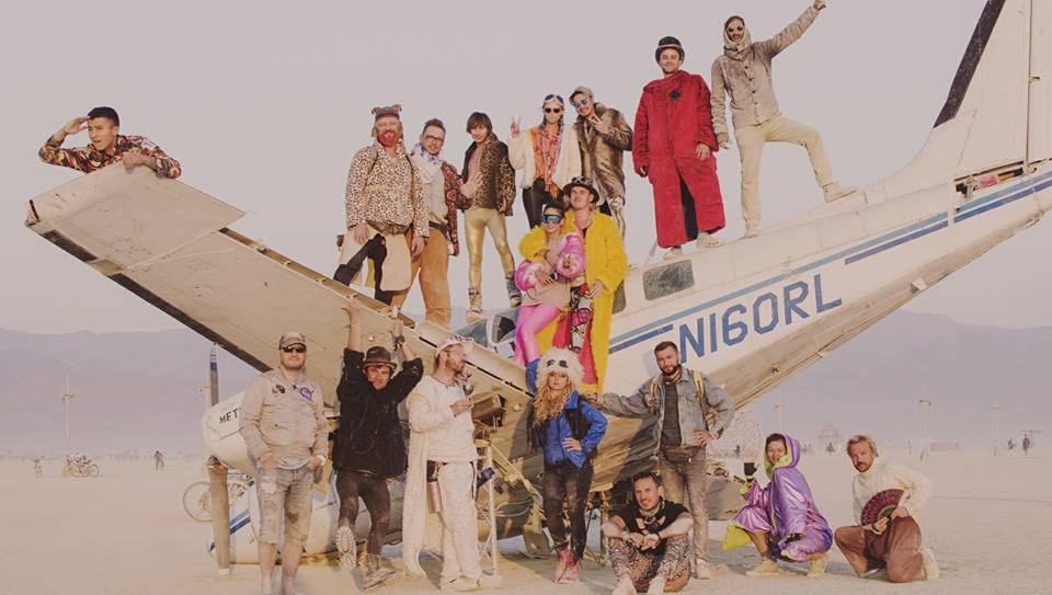 Влад Фісун з першим офіційним табором Куренівка на Burning Man 2017, Невада, США